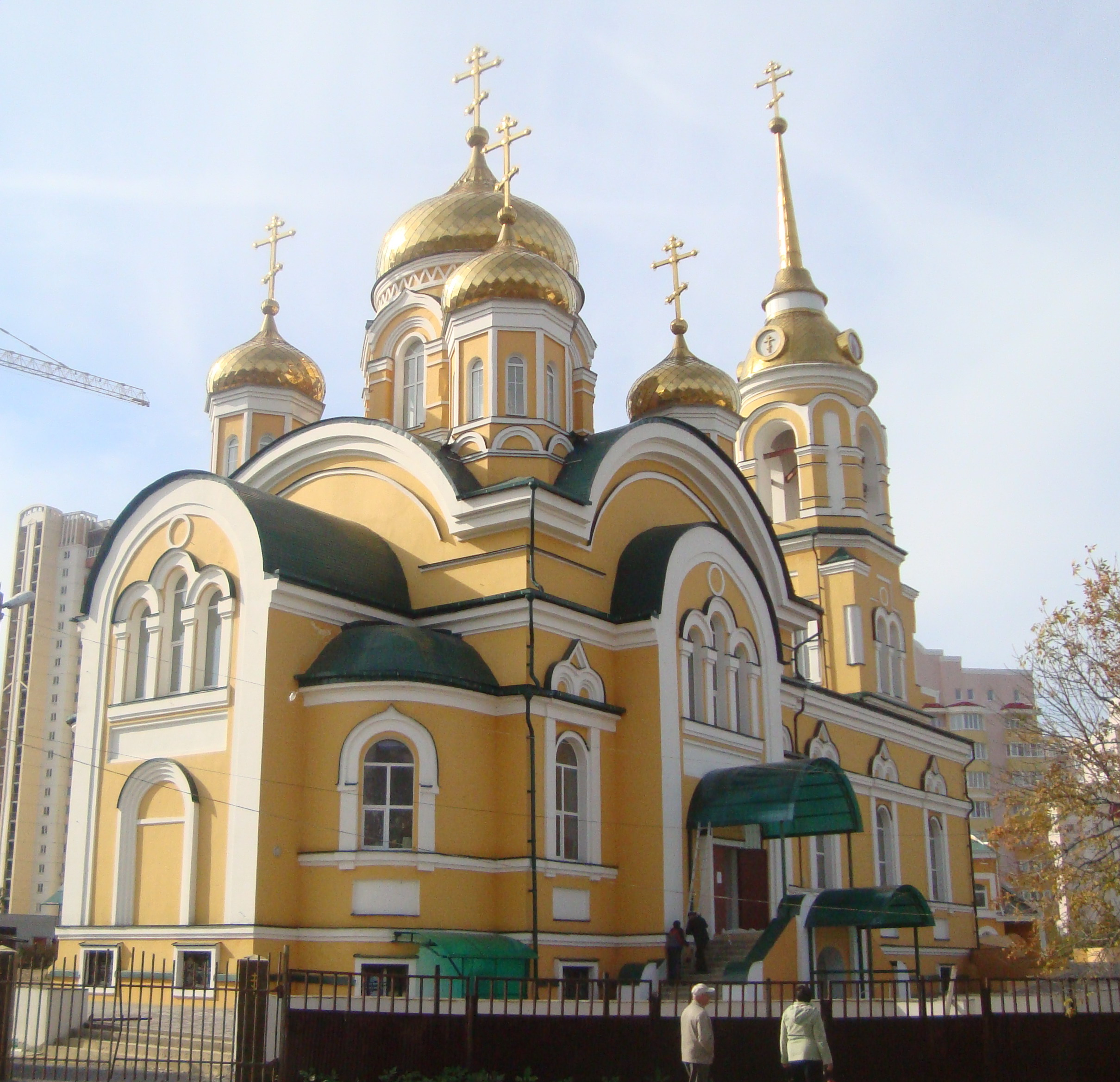 Храм Всех Святых (Липецк)